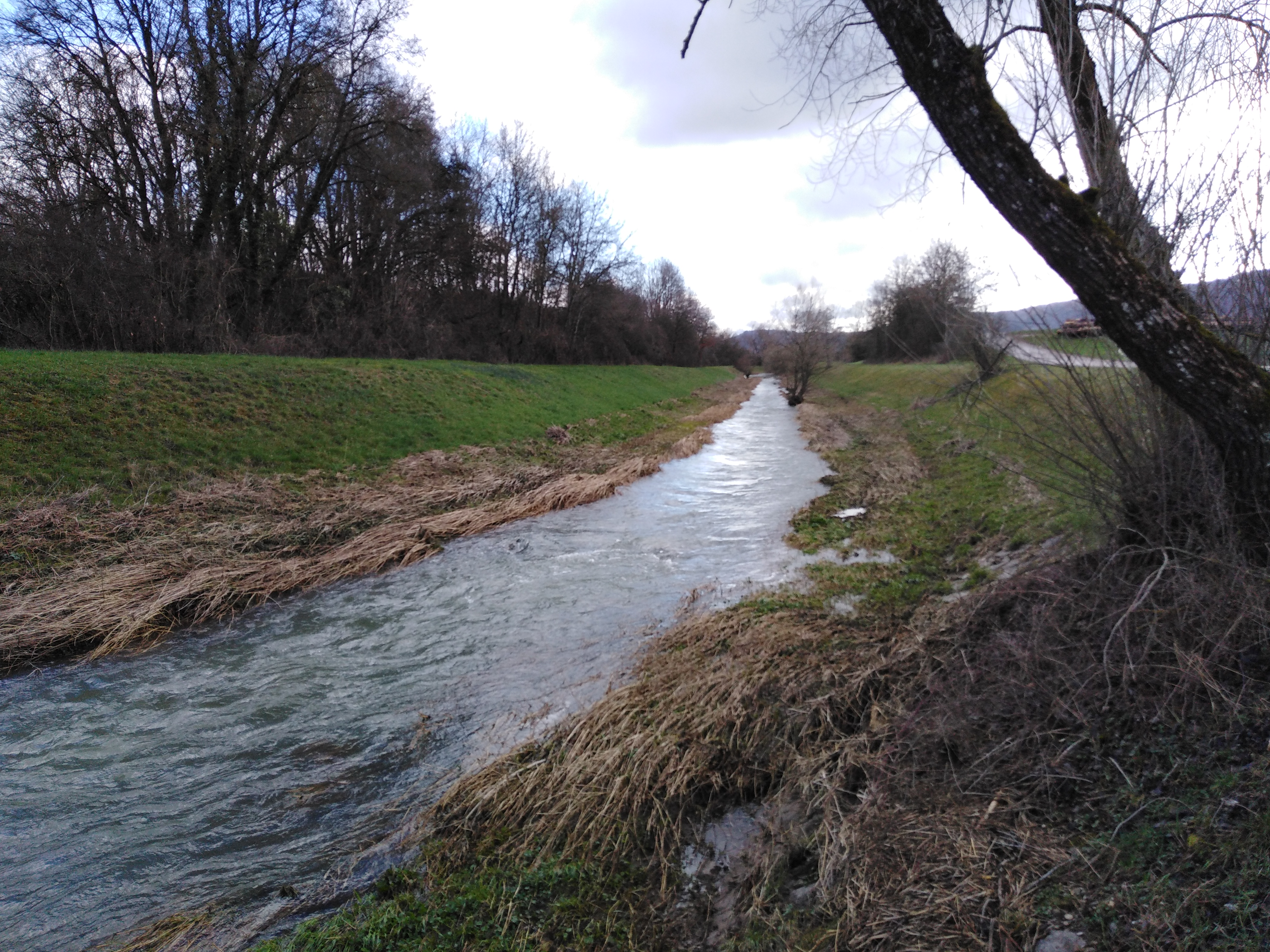 Lauchringen, Gemeinde im Landkreis Waldshut in Baden Württemberg. Der aus Richtung Grießen (Klettgau) fließende Schwarzbach.